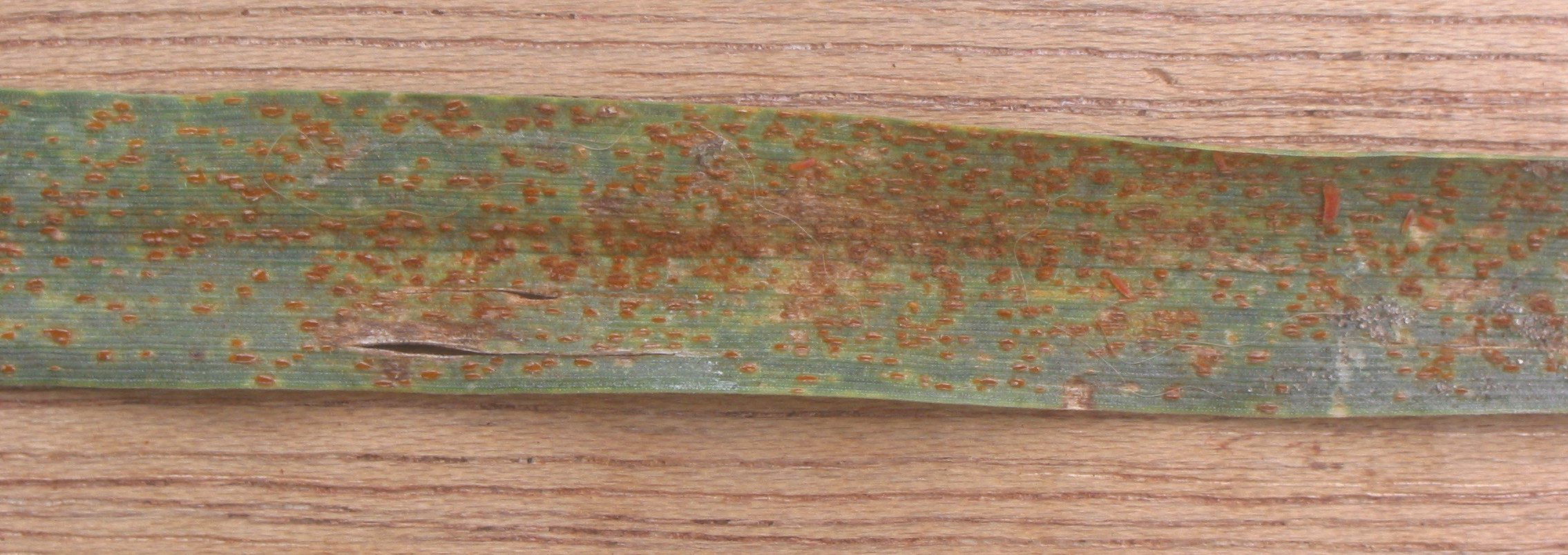 (nl: Bruine roest op tarwe) Puccinia recondita f.sp. tritici on Triticum aestivum